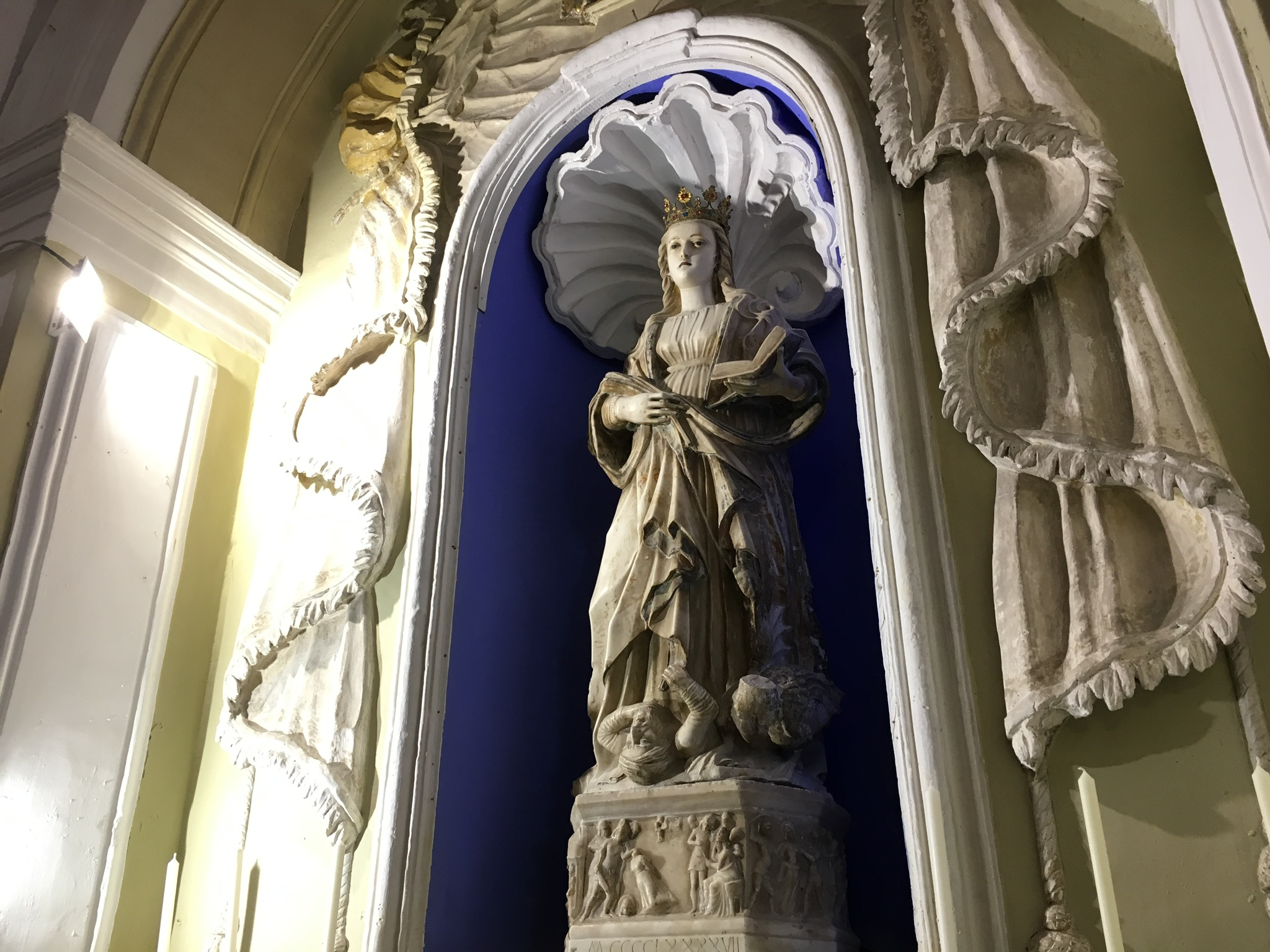 Statua quattrocentesca di Sant’Agrippina